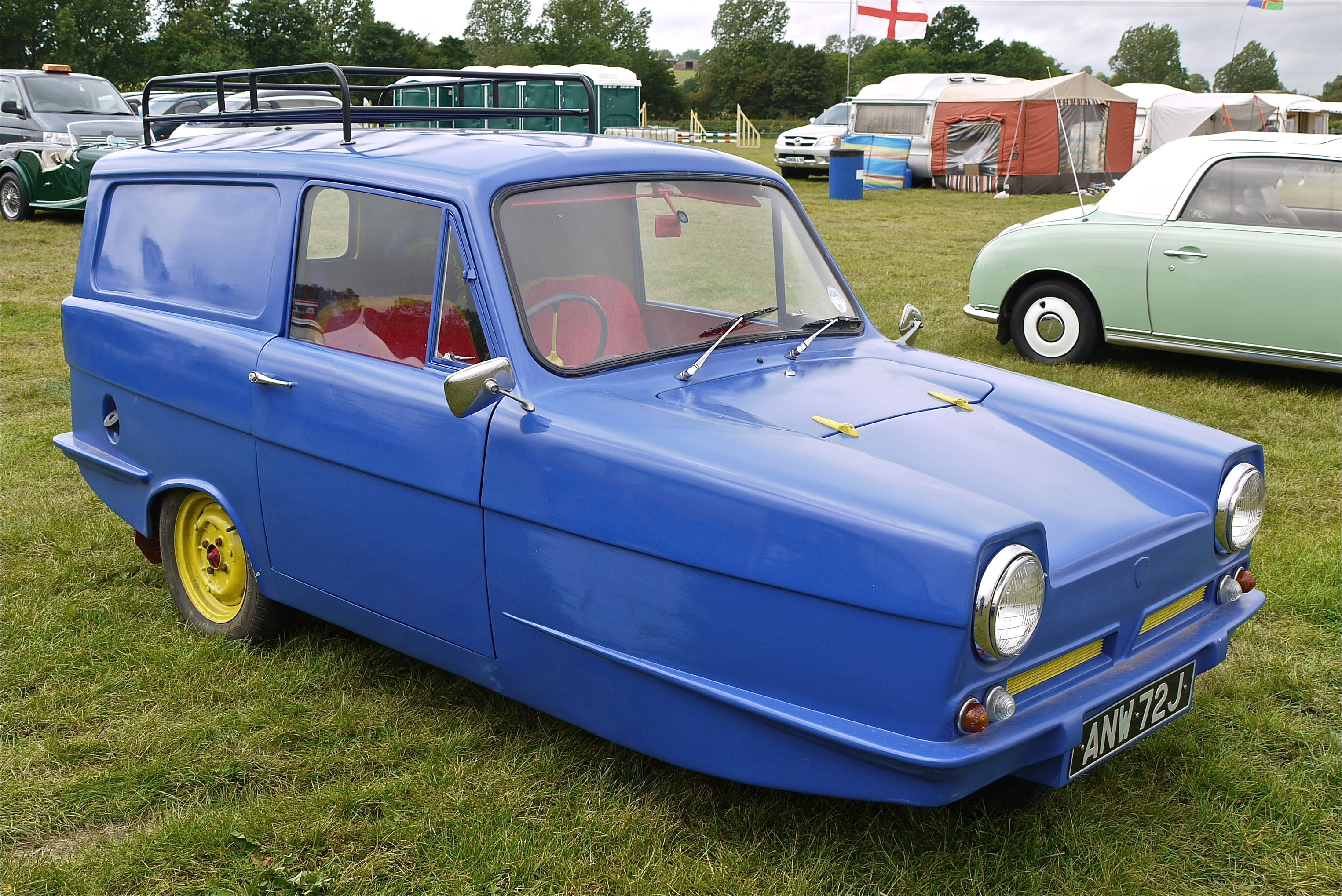 Panasonic G1 14-45 Lens